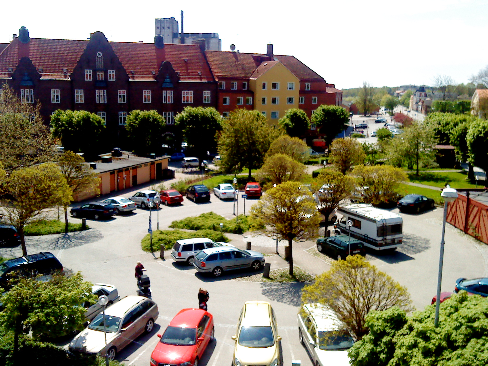 Sölvesborg, Blekinge.